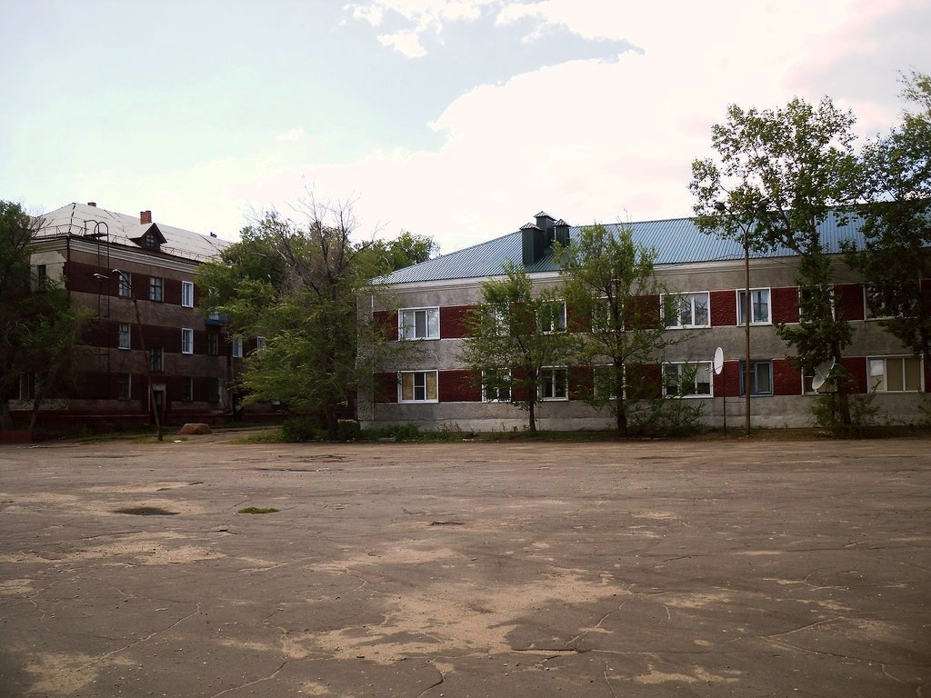 Центр поселка